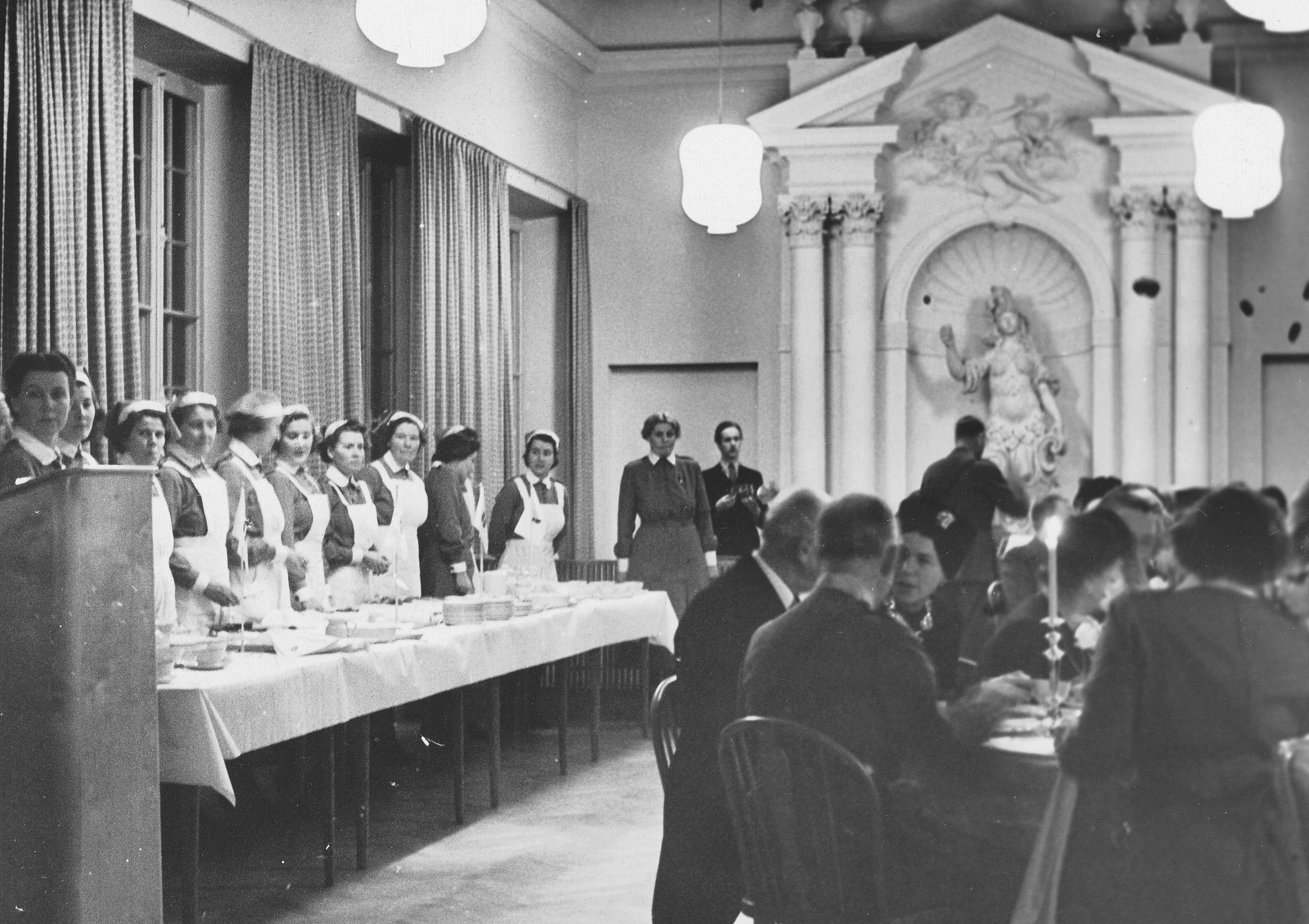 Från återinvigning av van der Nootska palatset genom Lottakåren